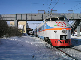 20 лет эксплуатации ЭР-200 (ст. Любань)